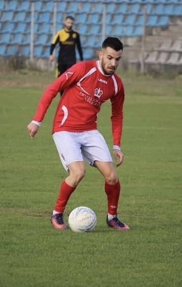 Илиян Генов с топката на градския стадион в гр. Велинград срещу отбора на Родопи (Козарско)